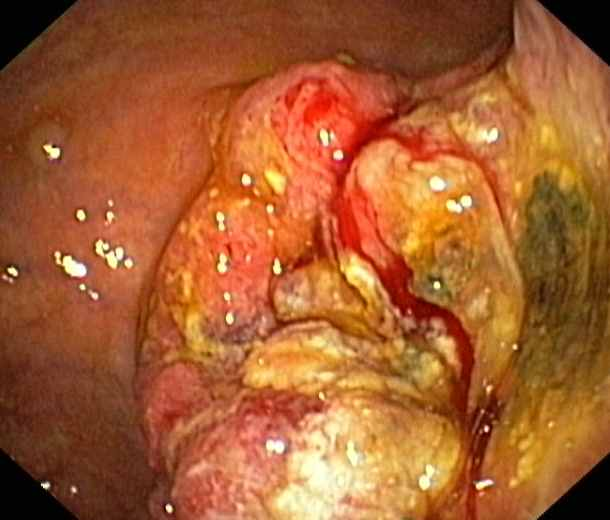 Magenkrebs im fortgeschrittenen Stadtium (endoskopisches Bild).